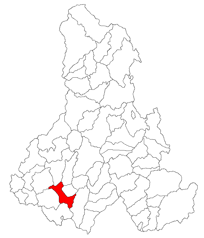 Categorie:Hărţi ale judeţului Harghita Contents 1 Licensing 2 Sursă 3 Licensing 4 Original upload log Licensing Sursă ro::Imagine:Harta_jud_Harghita.png